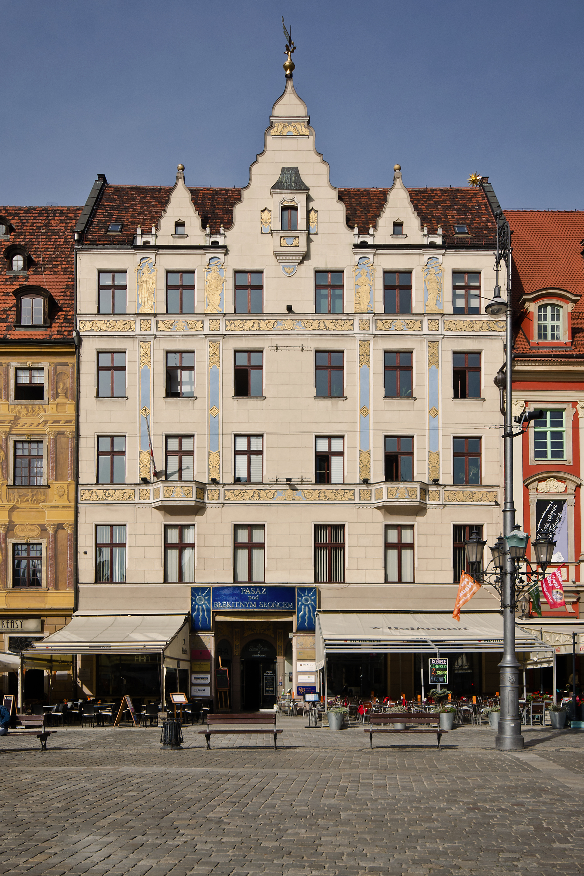 Kamienica „Pod Niebieskim Słońcem” z oficyną północną i południową Rynek 7, Miasto Wrocław - Stare Miasto